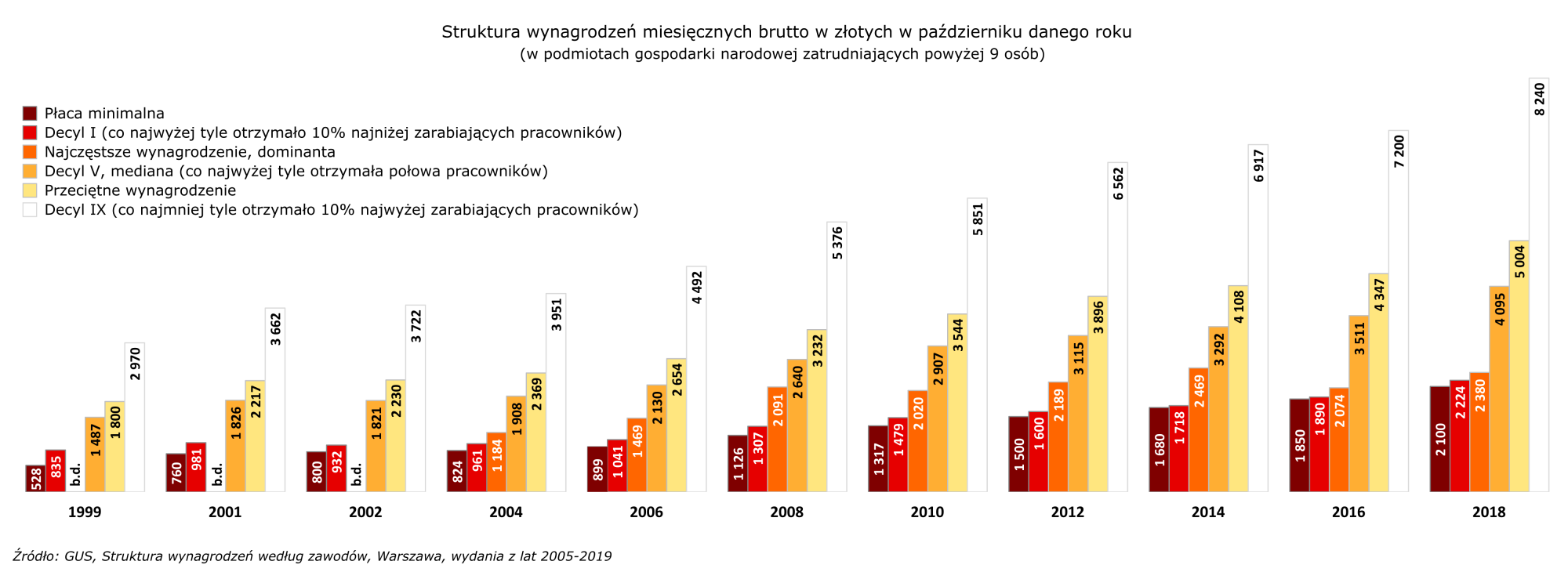 Struktura wynagrodzeń brutto w październiku danego roku (w podmiotach gospodarki narodowej zatrudniających powyżej 9 osób). Źródło: [1] GUS, Struktura wynagrodzeń według zawodów w październiku, Warszawa, wydania z lat 2005-2015 [2] GUS, Struktura wynagrodzeń według zawodów w październiku 2016 r., Warszawa 2017 r.